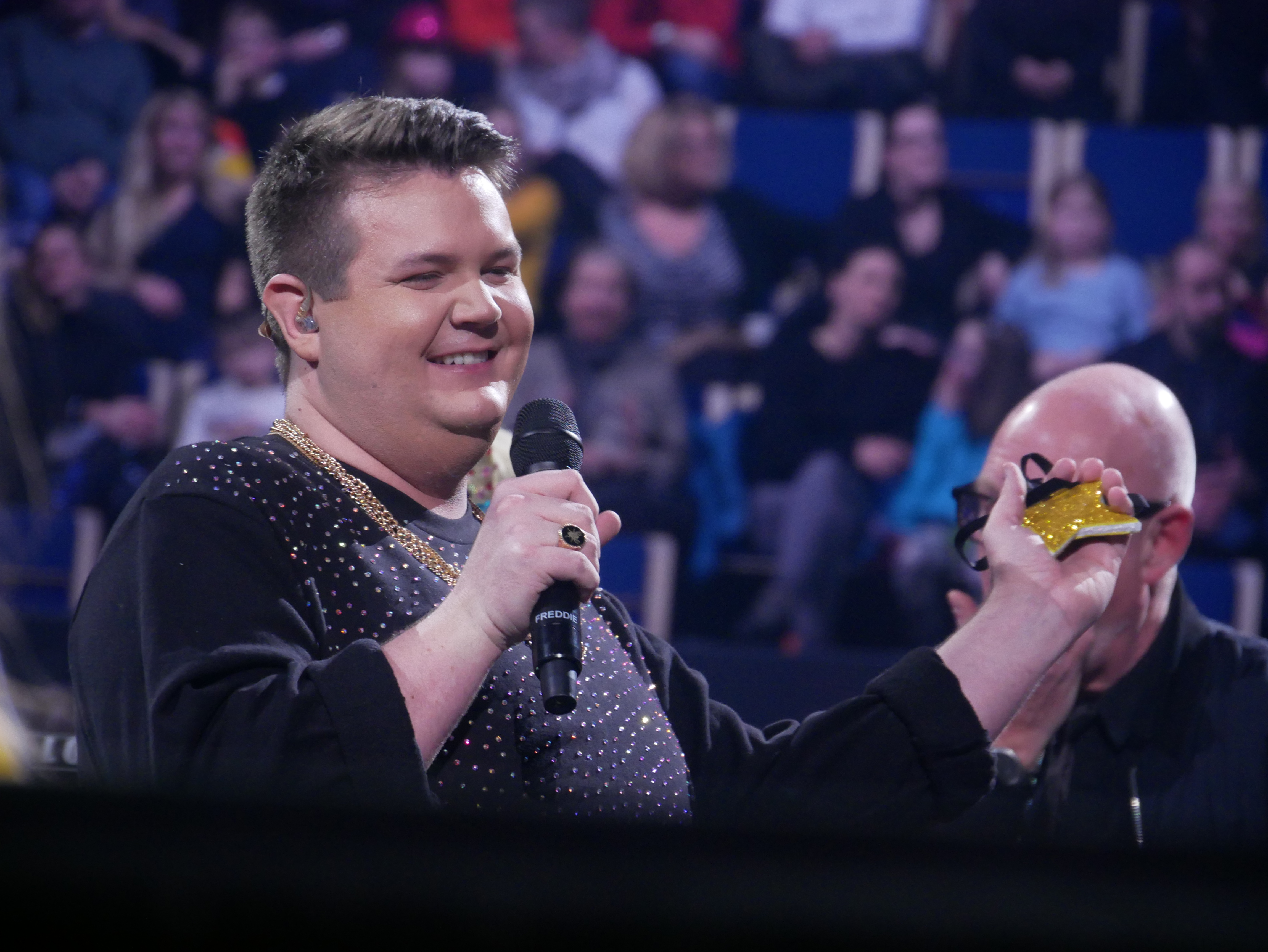 Melodifestivalen 2018, Deltävling 1, Löfbergs Arena, Karlstad Freddie Svensson, Melodifestivalen 2018